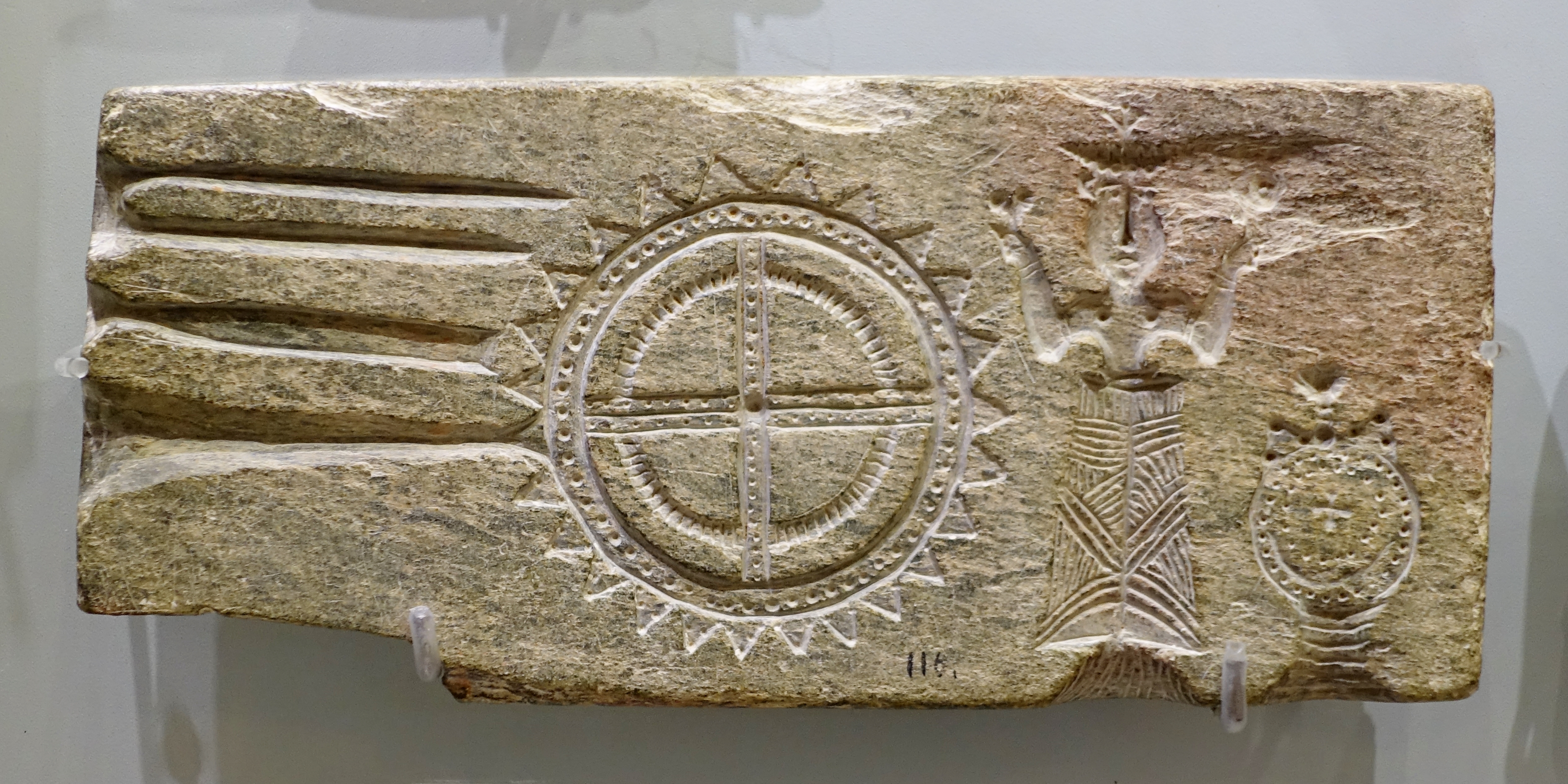 Schieferform zum Gießen von Kultfiguren und Symbolen, gefunden nahe dem Weiler Agia Triada an der Straße von Palekastro nach Sitia (1370–1200 v. Chr.), Archäologisches Museum von Iraklio, Kreta, Griechenland